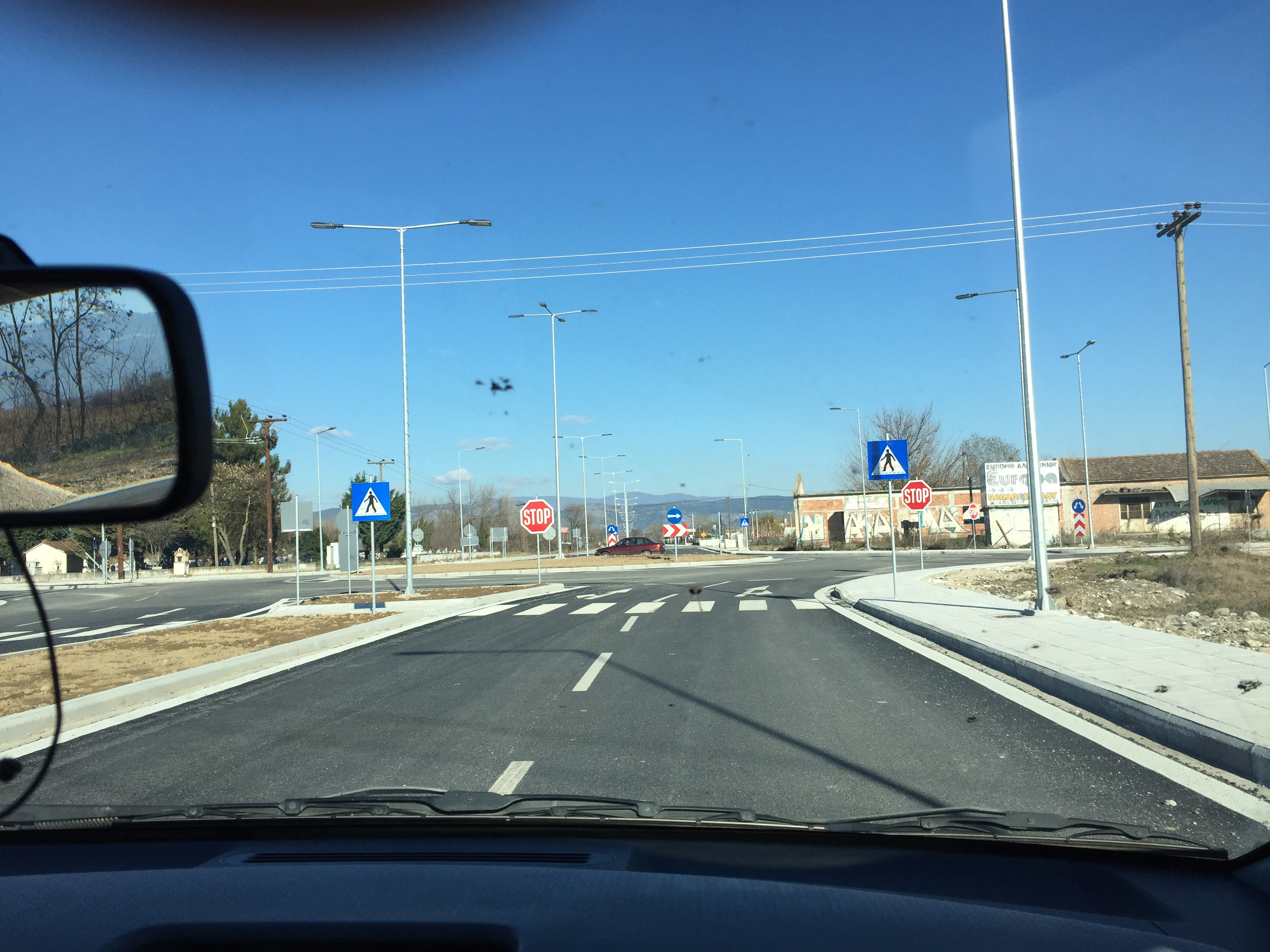 Ο νέος κυκλικός κόμβος του Ριζαριού της Περιφερειακής Οδού Τρικάλων